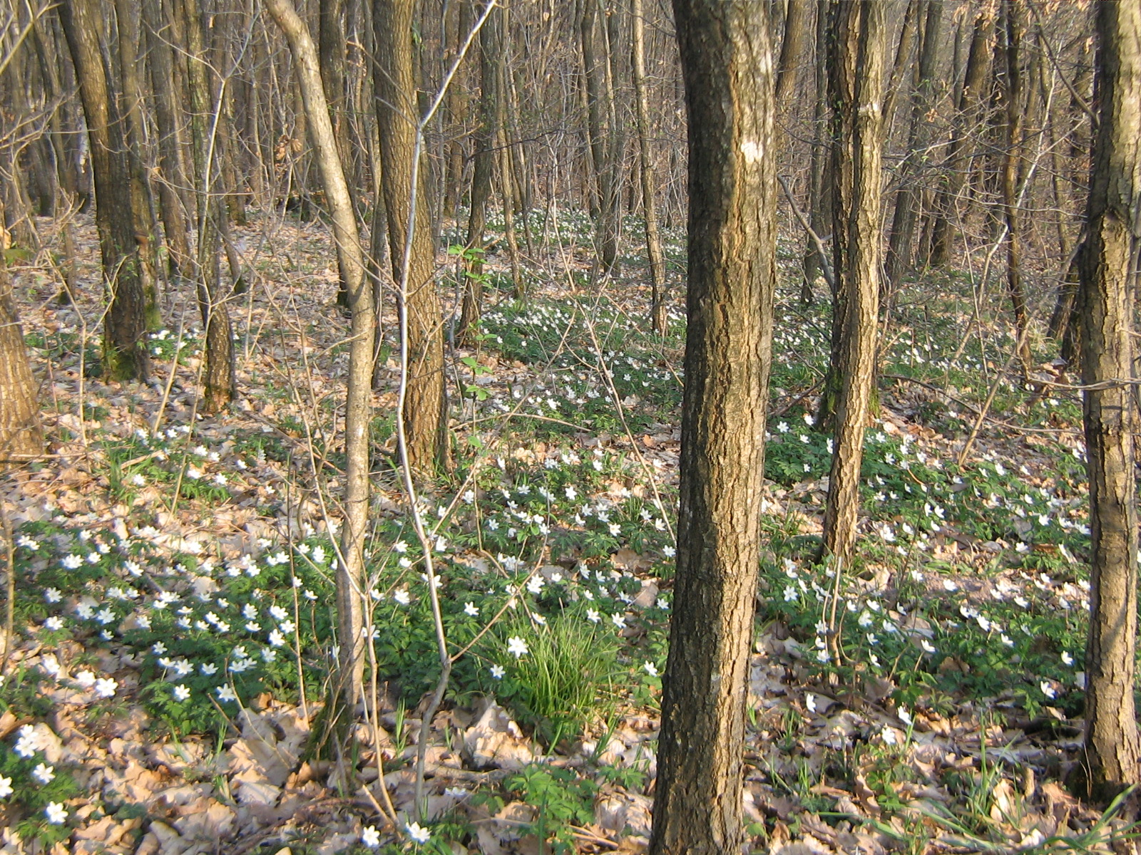 Anémones sylvie dans la forêt de Haguenau (Alsace)